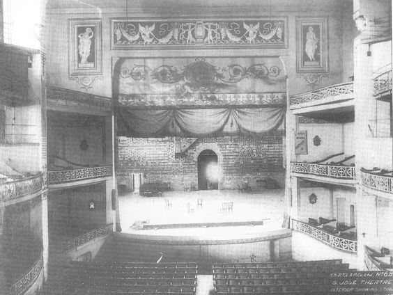 Interior do Theatro São José na década de 1920, com vista parcial da plateia e camarotes e visão completa do fosso da orquestra e do palco.